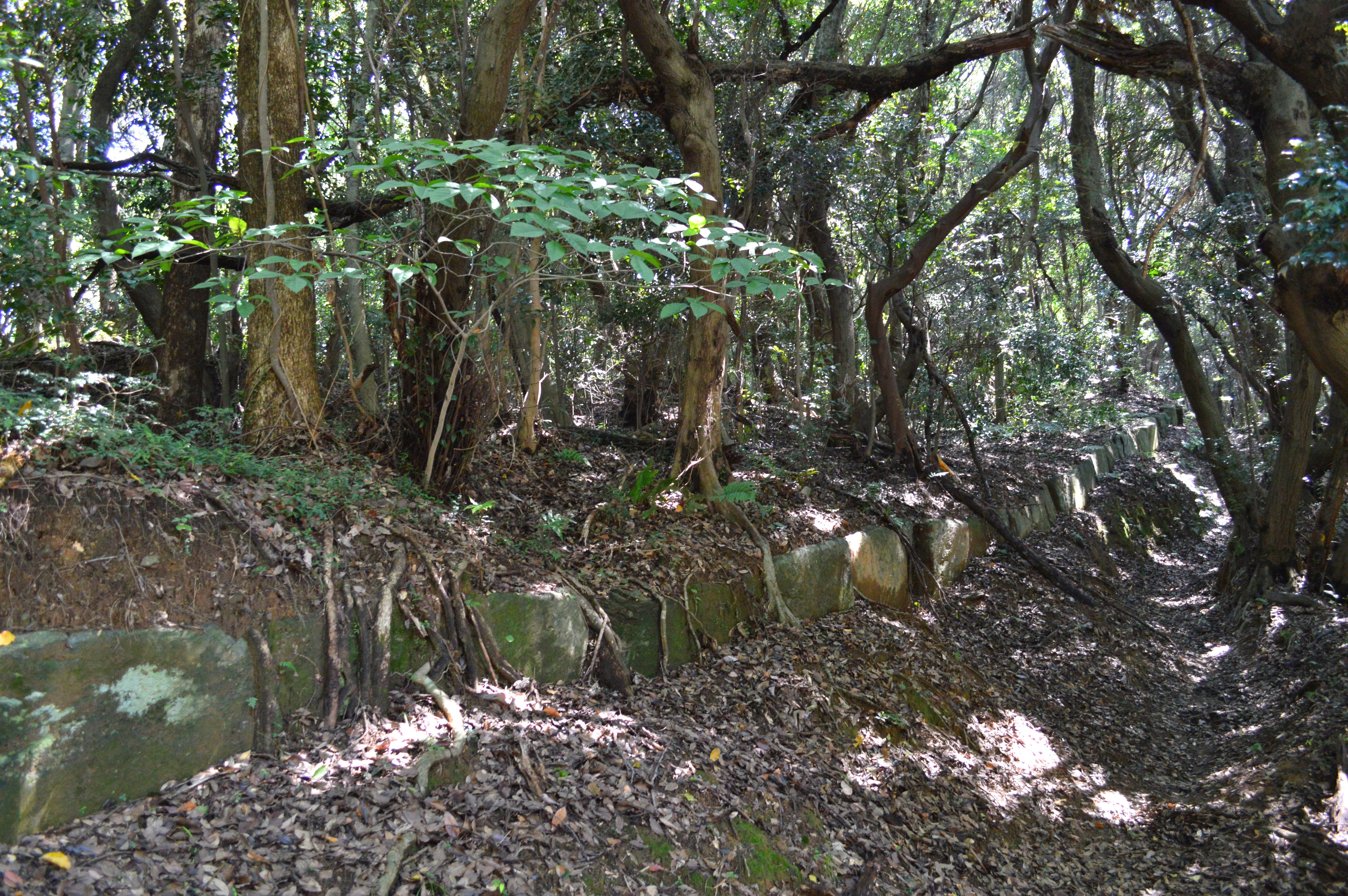 高良山神籠石